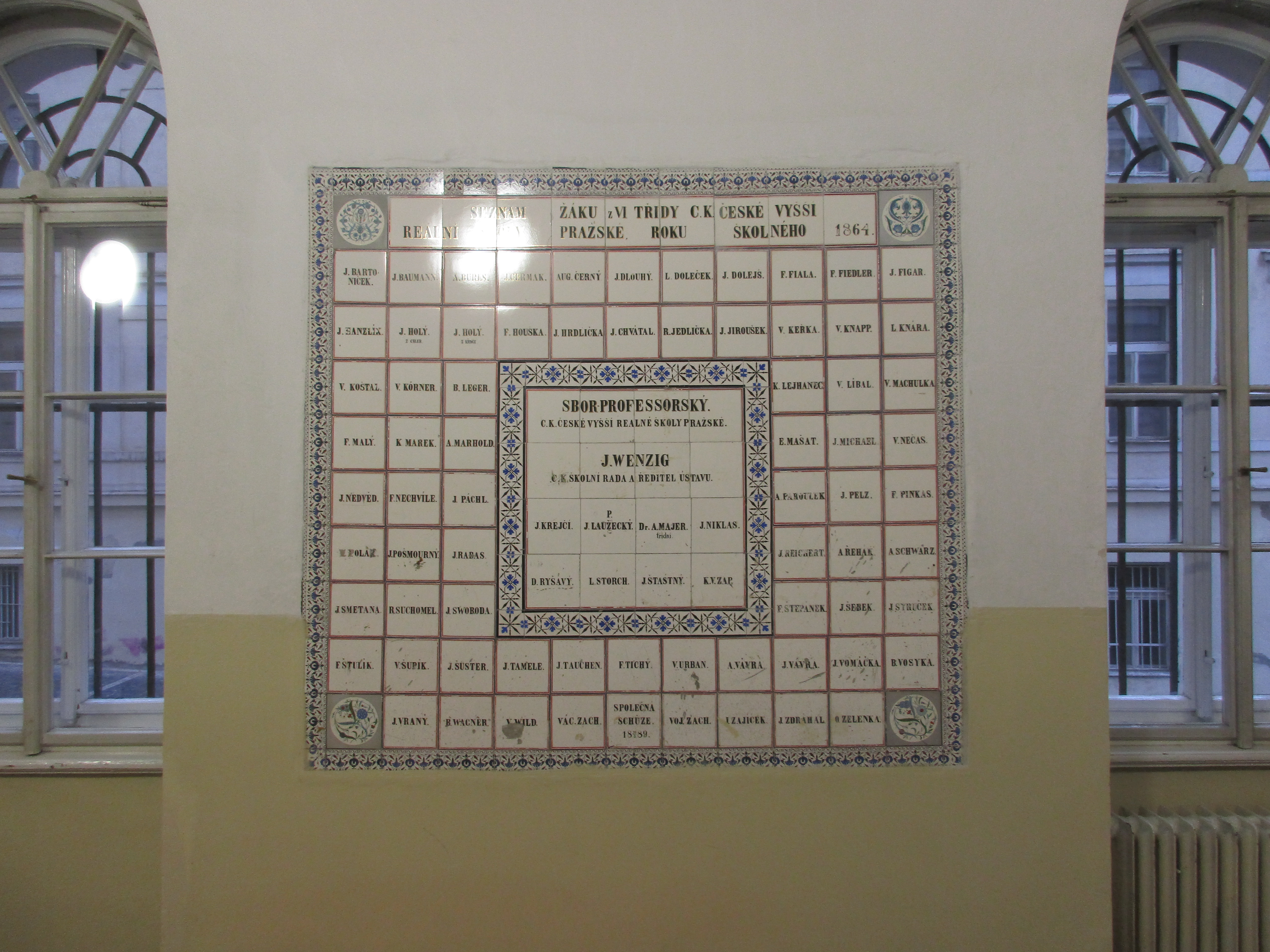 Keramická plaketa se jmény učitelů a žáků VI. třídy z roku 1864.